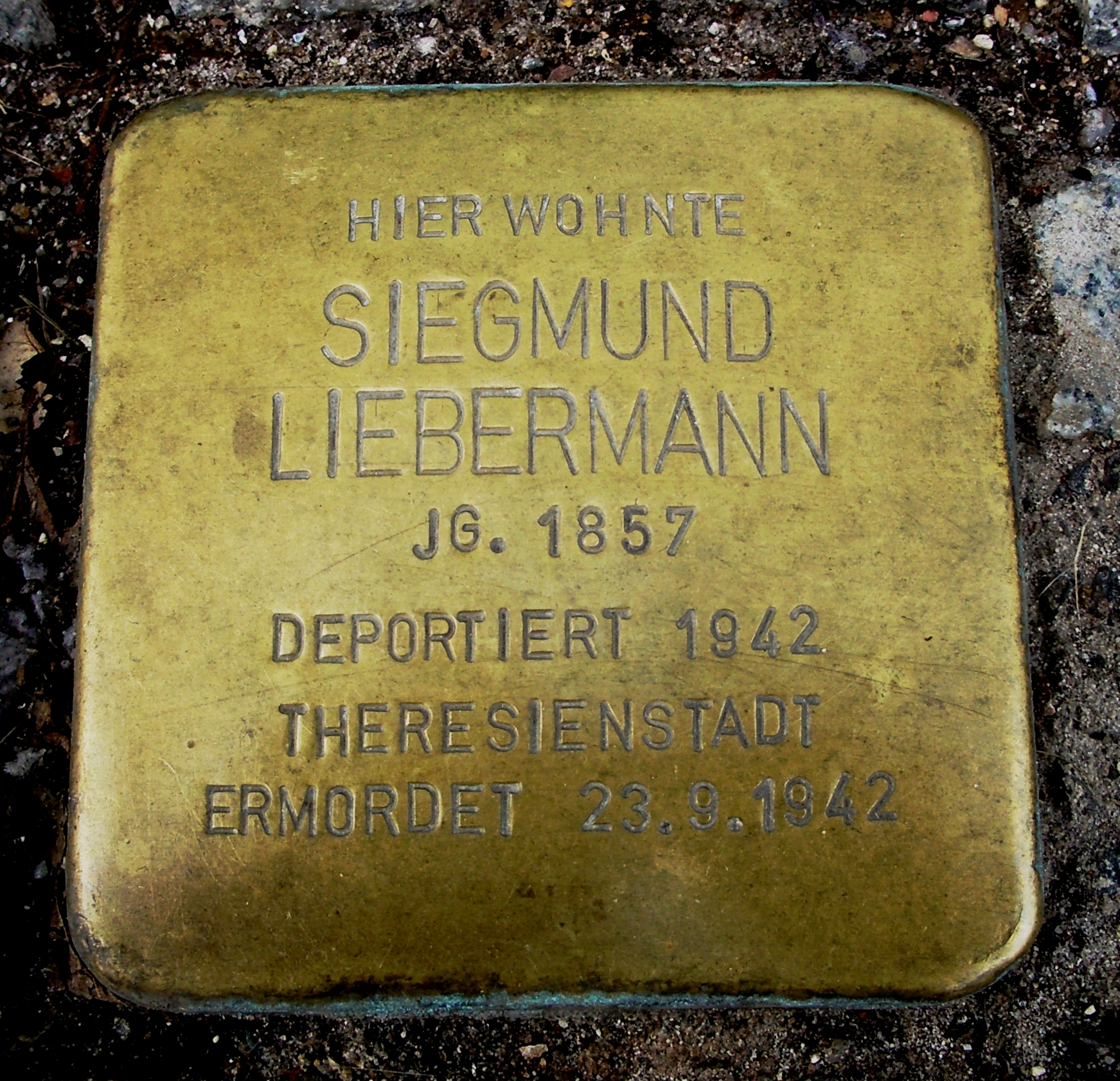 Der Stolperstein für Siegmund Liebermann befindet sich in der Bahnhofstraße 12 in Neu-Ulm.